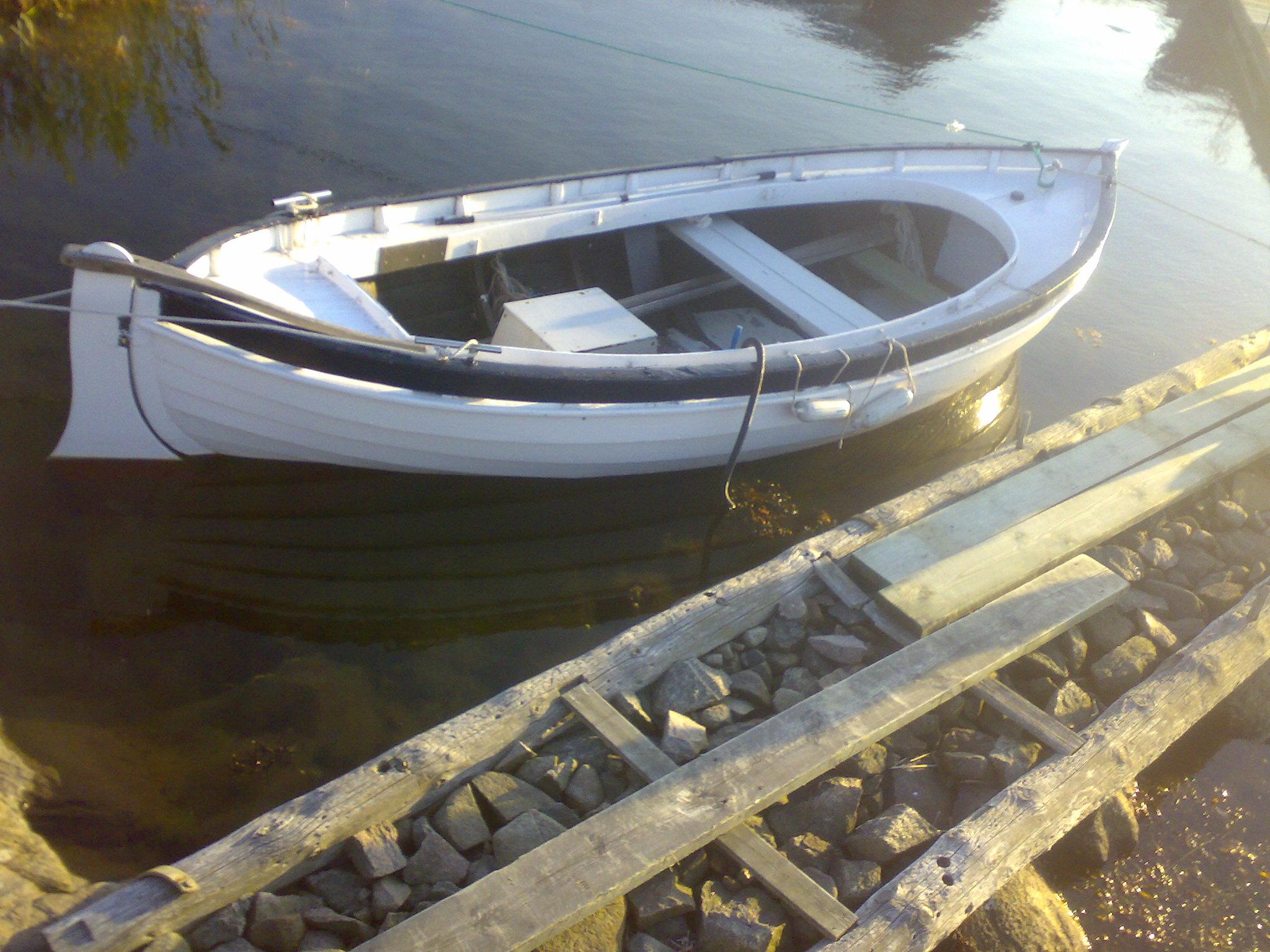 Sjekte i Blekinge, Sverige